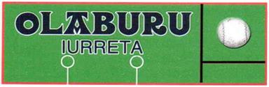 Olaburu pilota taldearen logoa